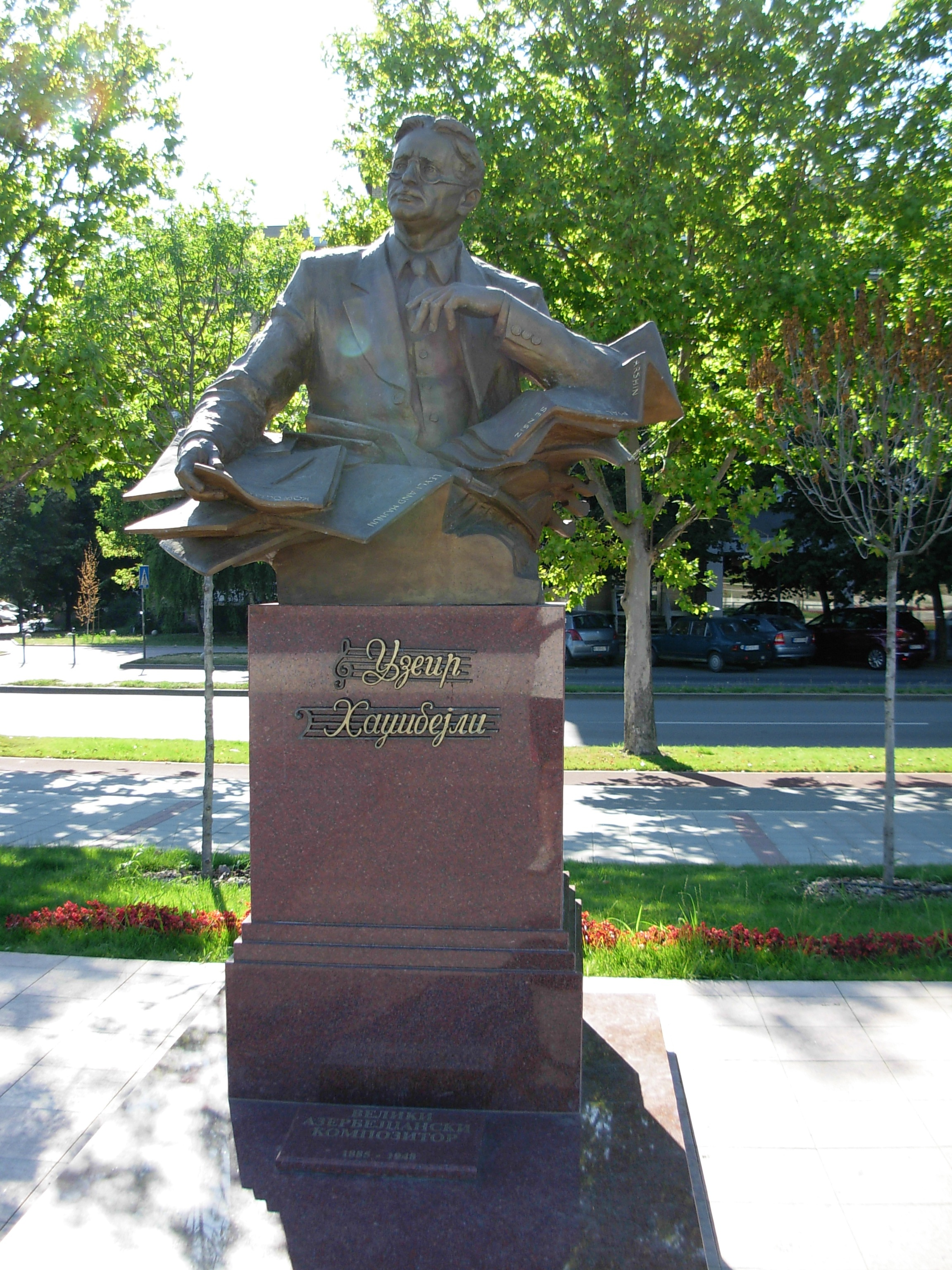 Bista Uzeira Hadžibejlija na Beogradskom keju u Novom Sadu.